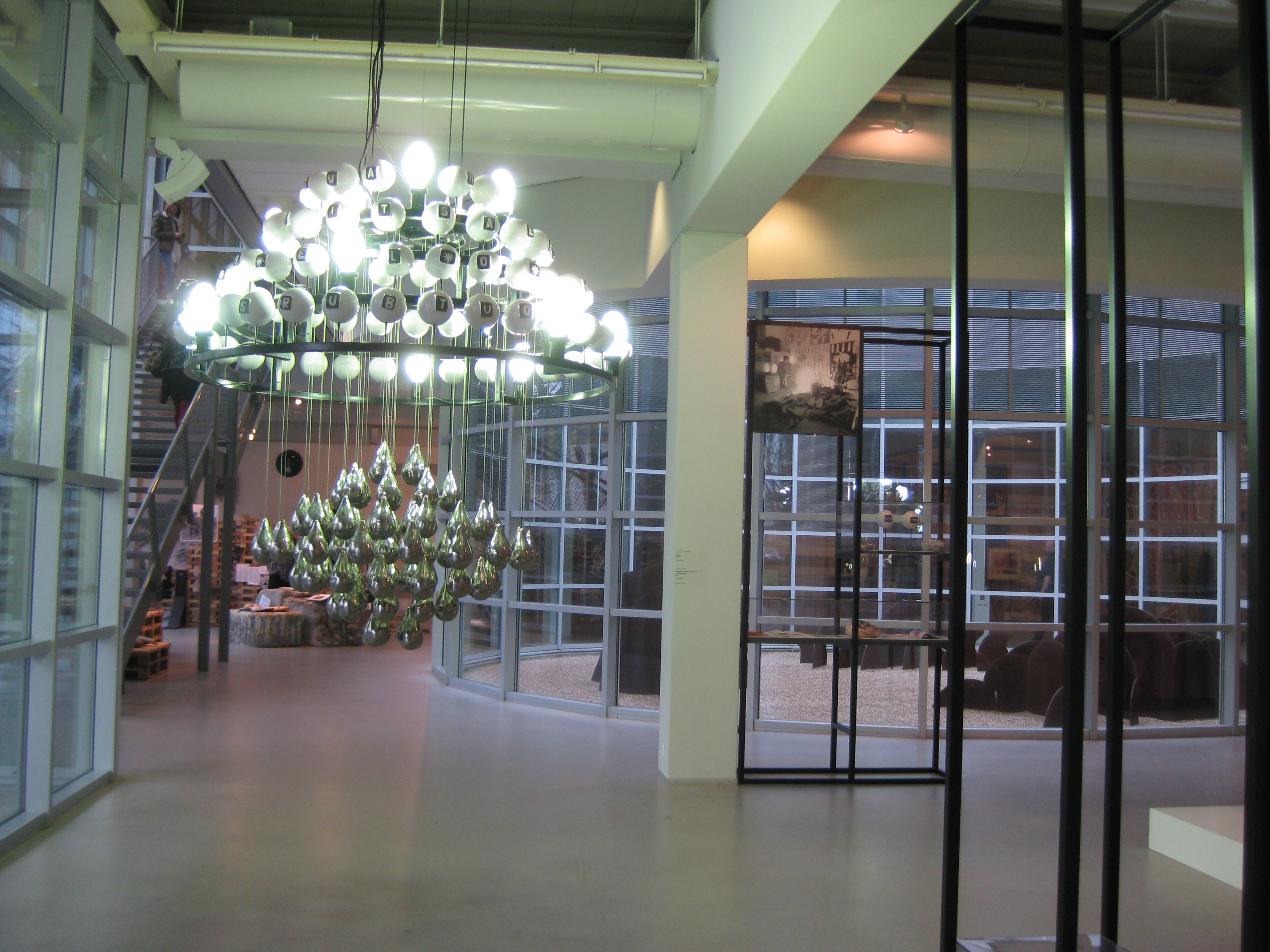 Interieur Cobra Museum met de Japanse kiezeltuin van Shinkichi Tajiri rechtsachter.